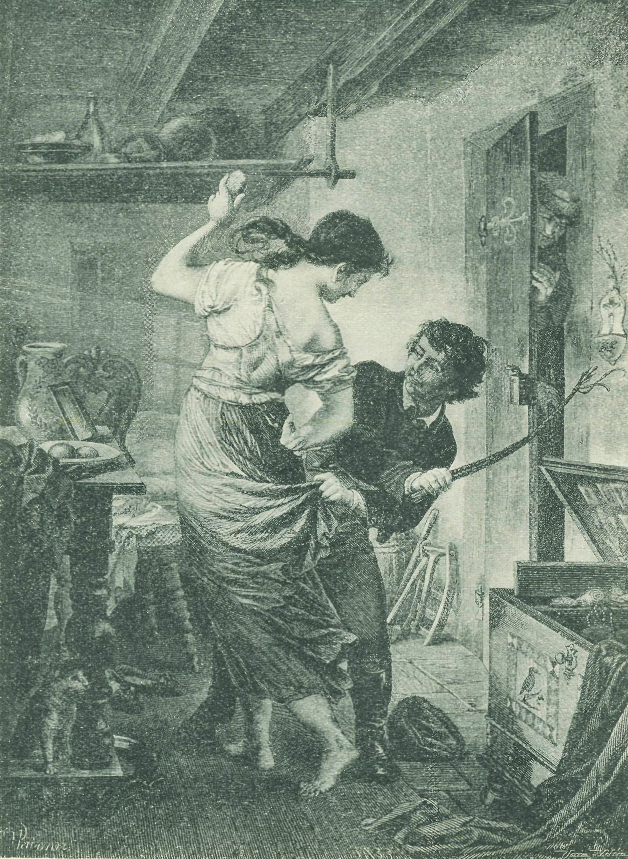 Помлазка. Чехия, 1910. Рис. П. Майкснер